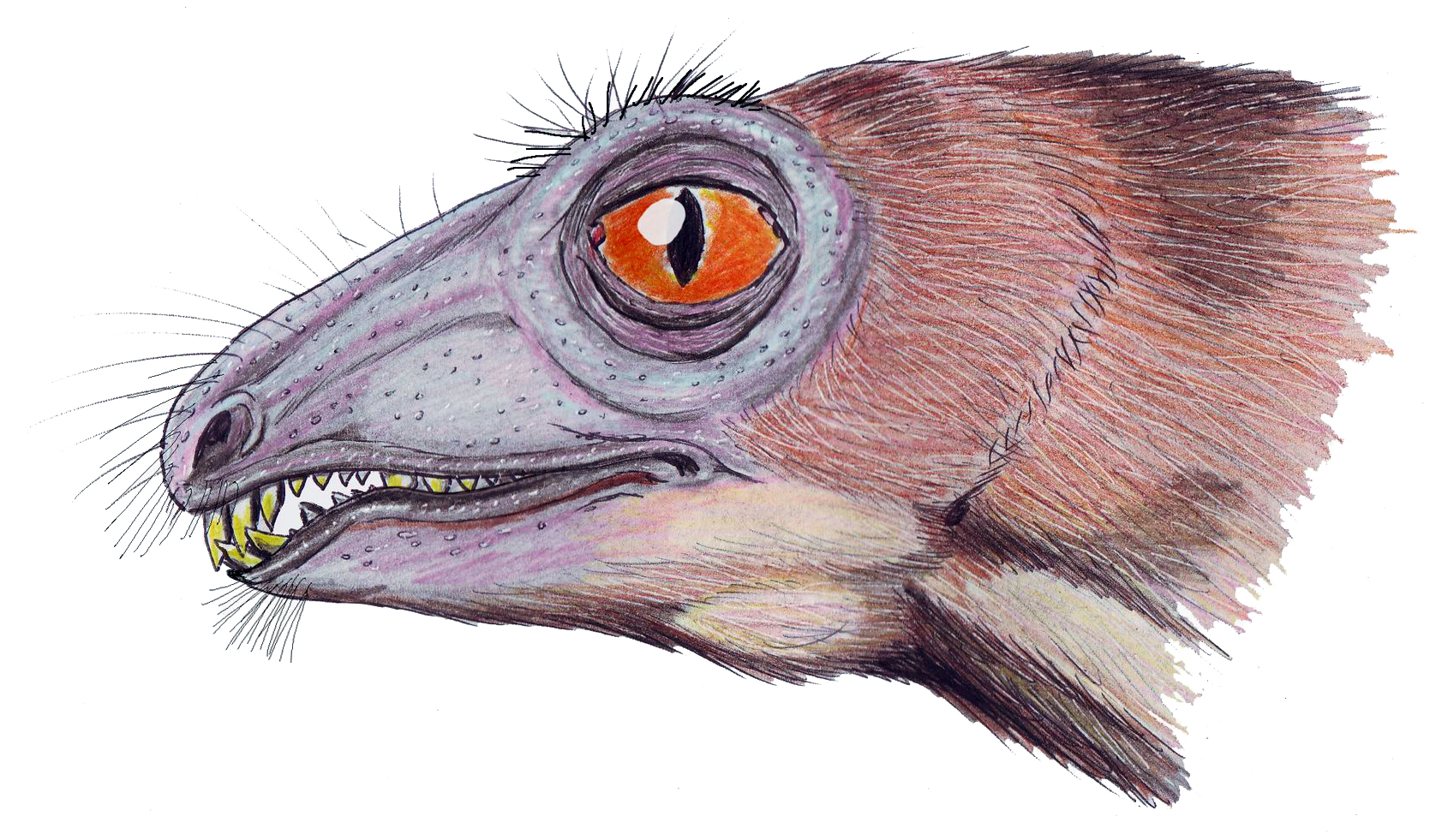 Niaftasuchus zekkeli